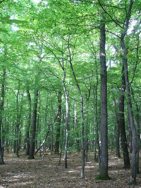 Česká republika, Přírodní rezervace Žernov - cenný dubohabřinový les